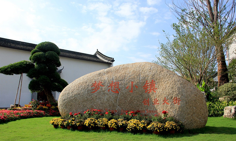 中文（中国大陆）: 杭州未来科技城 梦想小镇